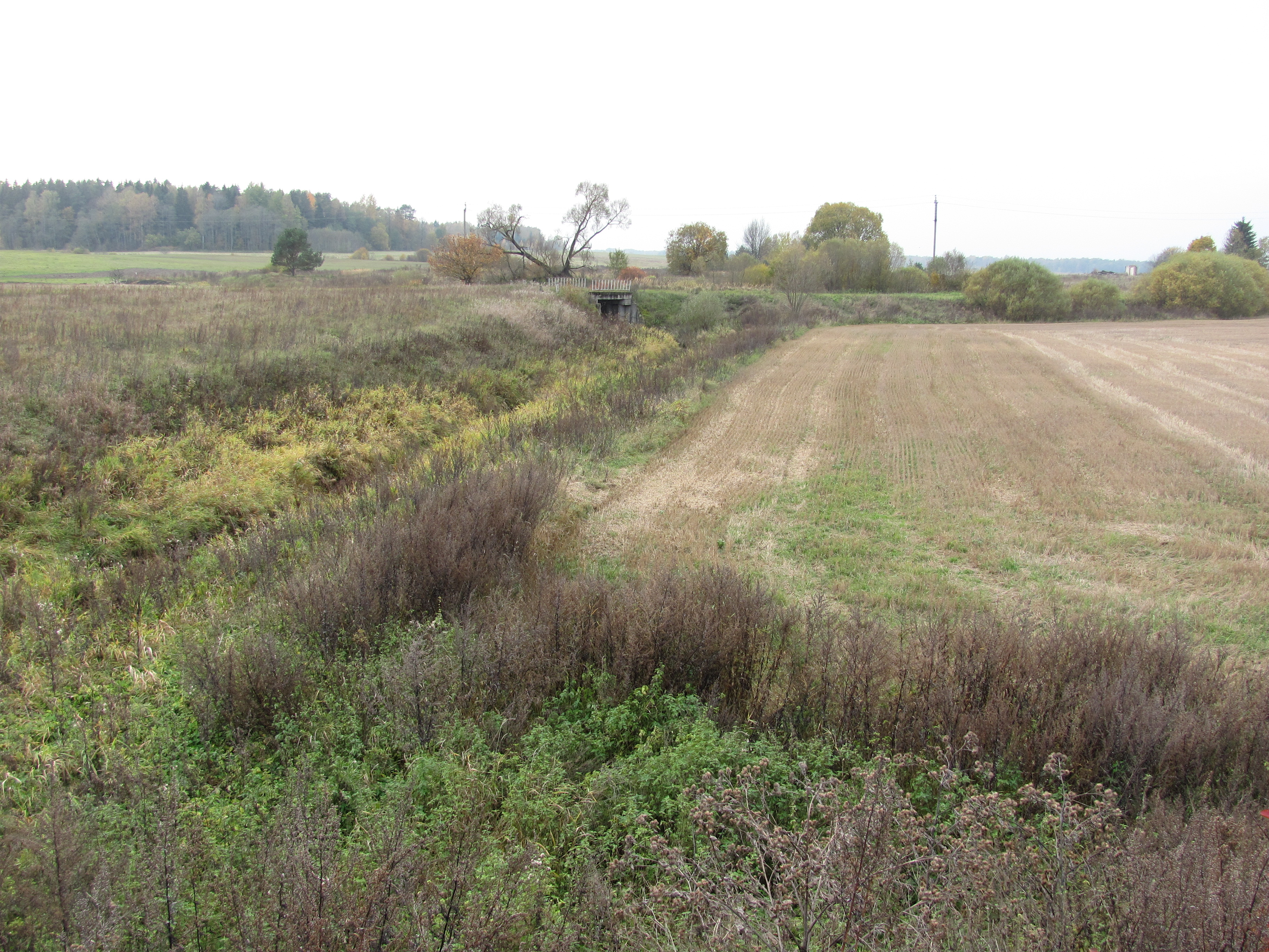 Rokiškio kaimiškoji sen., Lithuania